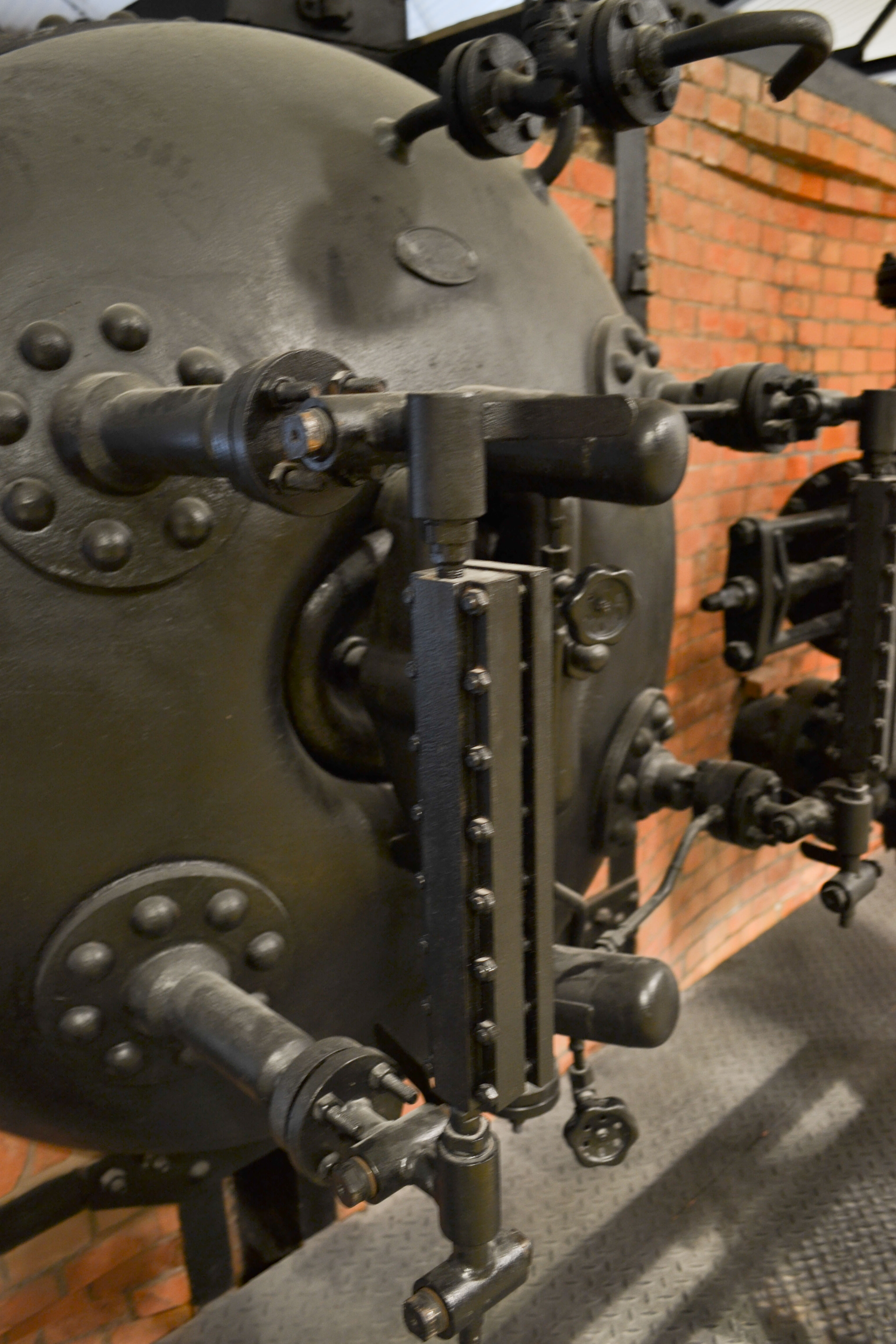 MCSW Elektrownia Radom - detal pieca2